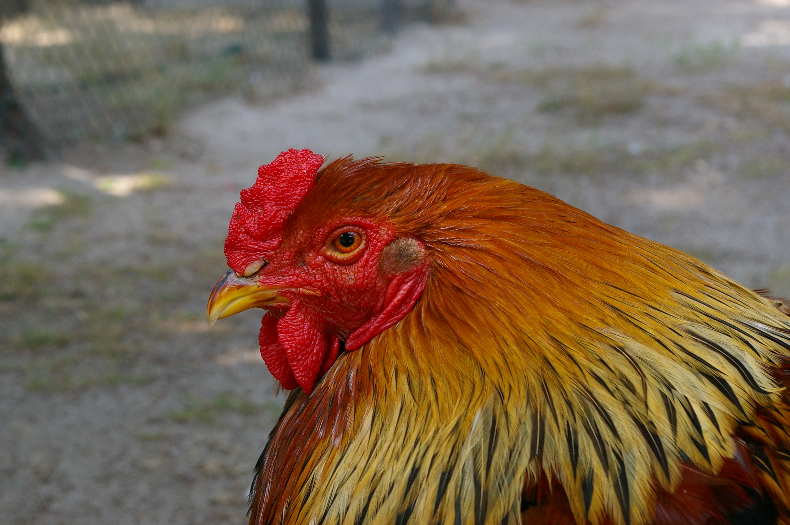 Asian Rooster